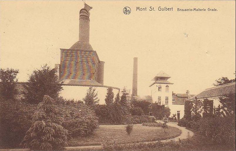 la Brasserie Grade à Mont St Guibert, début 20ème s.